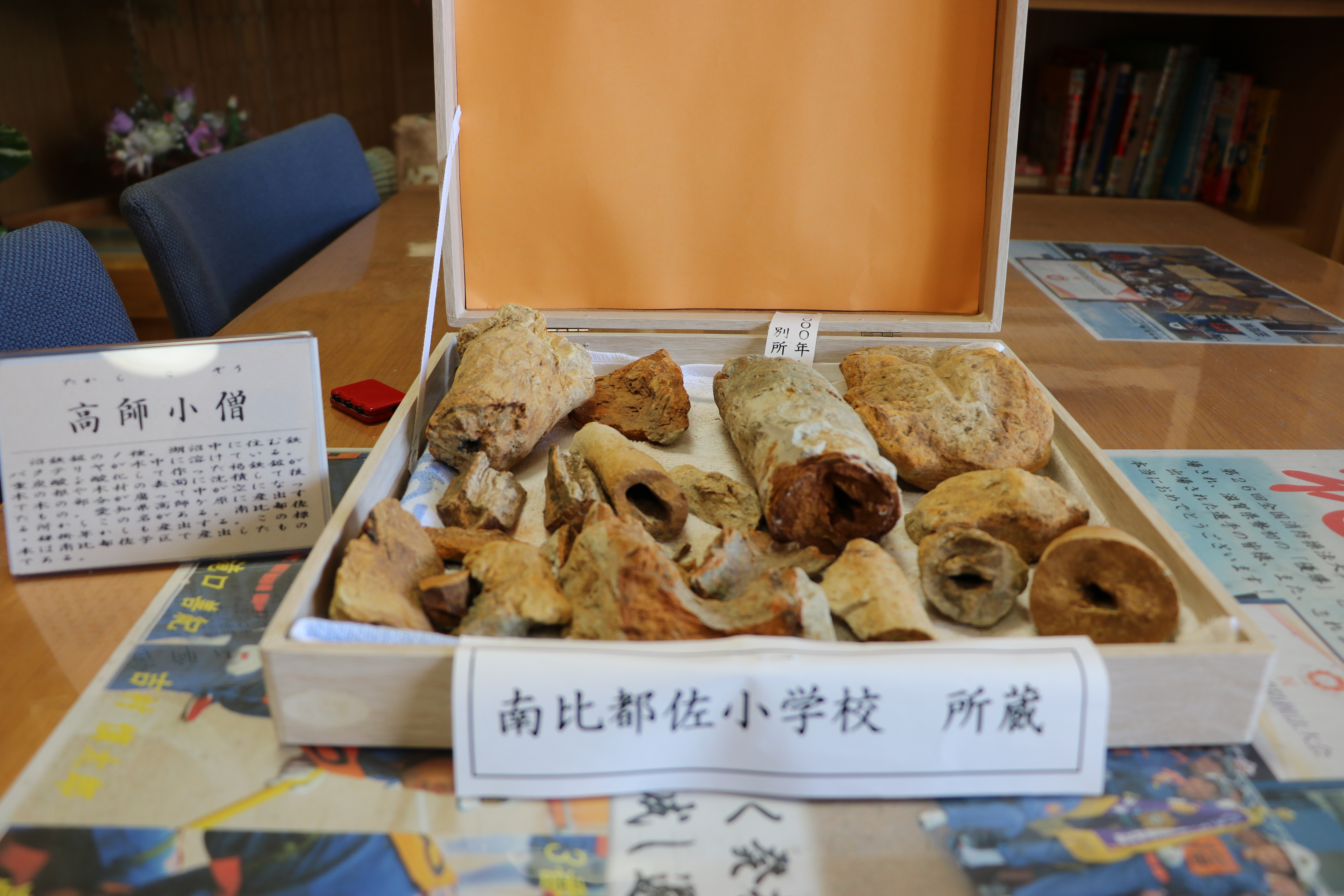 別所高師小僧（国指定天然記念物、滋賀県蒲生郡日野町）南比都佐公民館所蔵。公民館主事立ち合いのもと撮影。